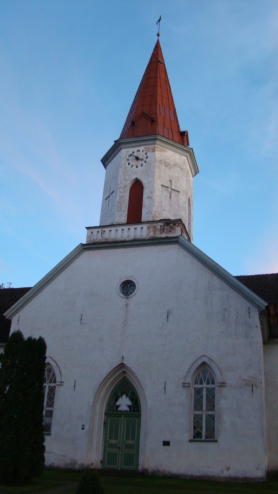 Smiltenes luterāņu baznīca, Smiltene, Baznīcas laukums 1